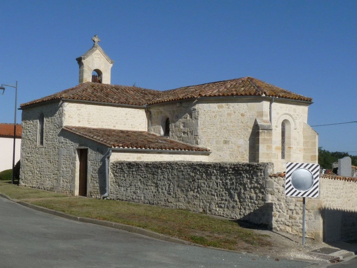 église de Prignac, Gironde, France